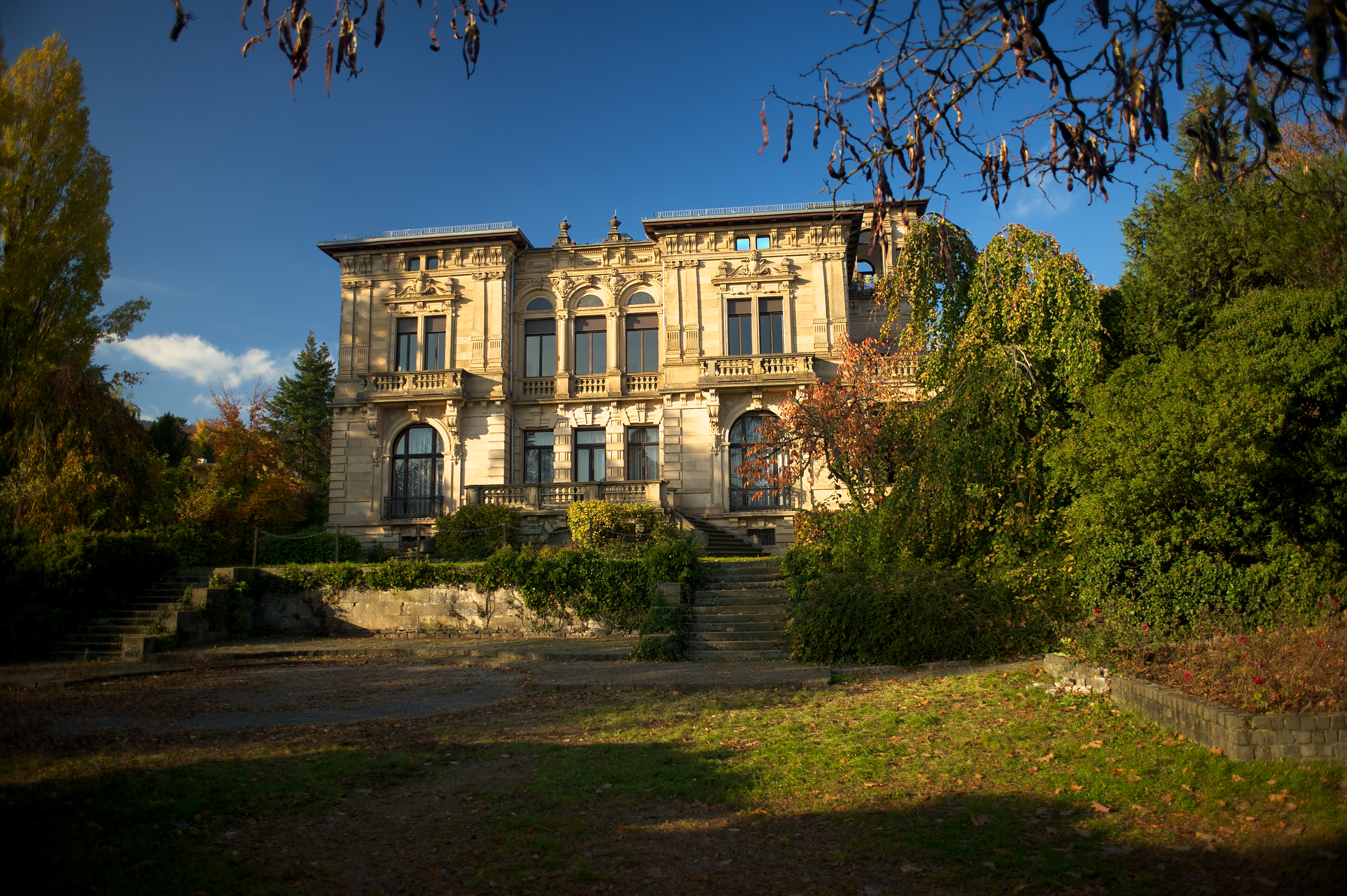 Neustadt an der Weinstraße, Maximilianstraße 25: Villa Böhm; repräsentativer späthistoristischer Sandsteinquaderbau mit Belvedereturm, Veranda, Pergola, Standerker, ab 1886, Architekt Ludwig Levy, Karlsruhe, Baudekor F. Binz, Karlsruhe; Ausstattung; in der Parkanlage Spolien, gotische Grabplatte, römischer Sarkophag